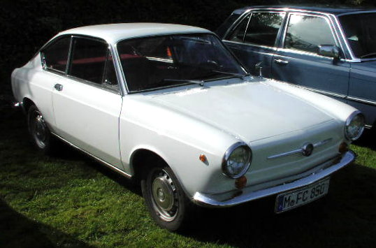 Fiat 850 Coupé (1st Series)